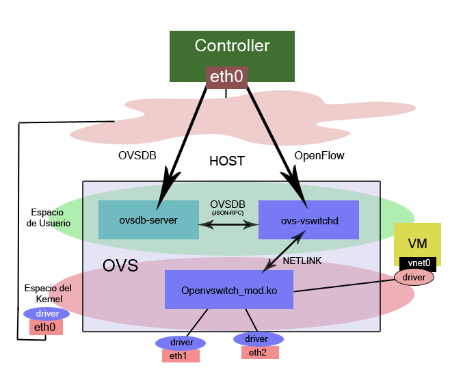 OVS con Controller